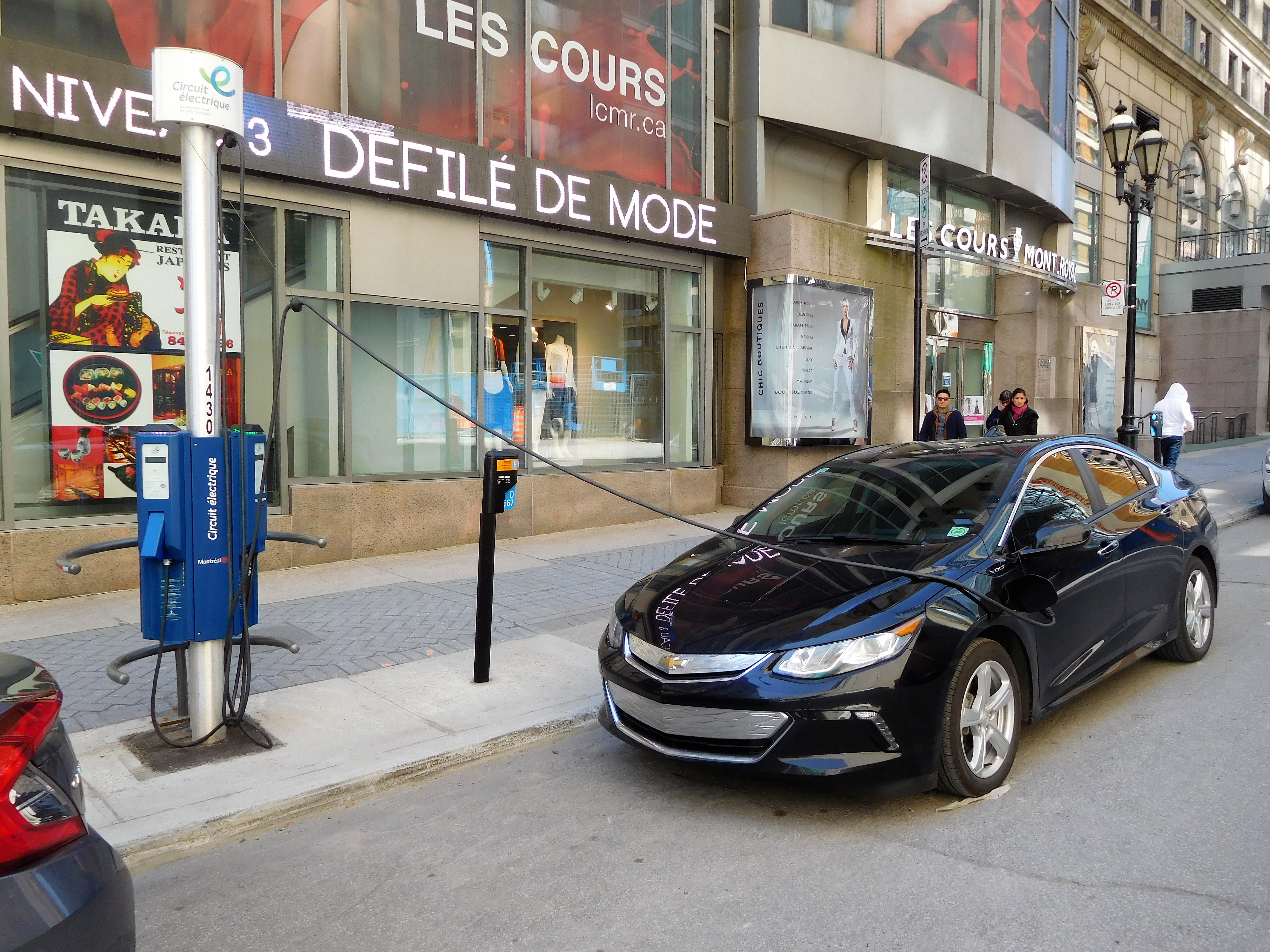 Le Circuit électrique d'Hydro-Québec, rue Metcalfe, Montréal